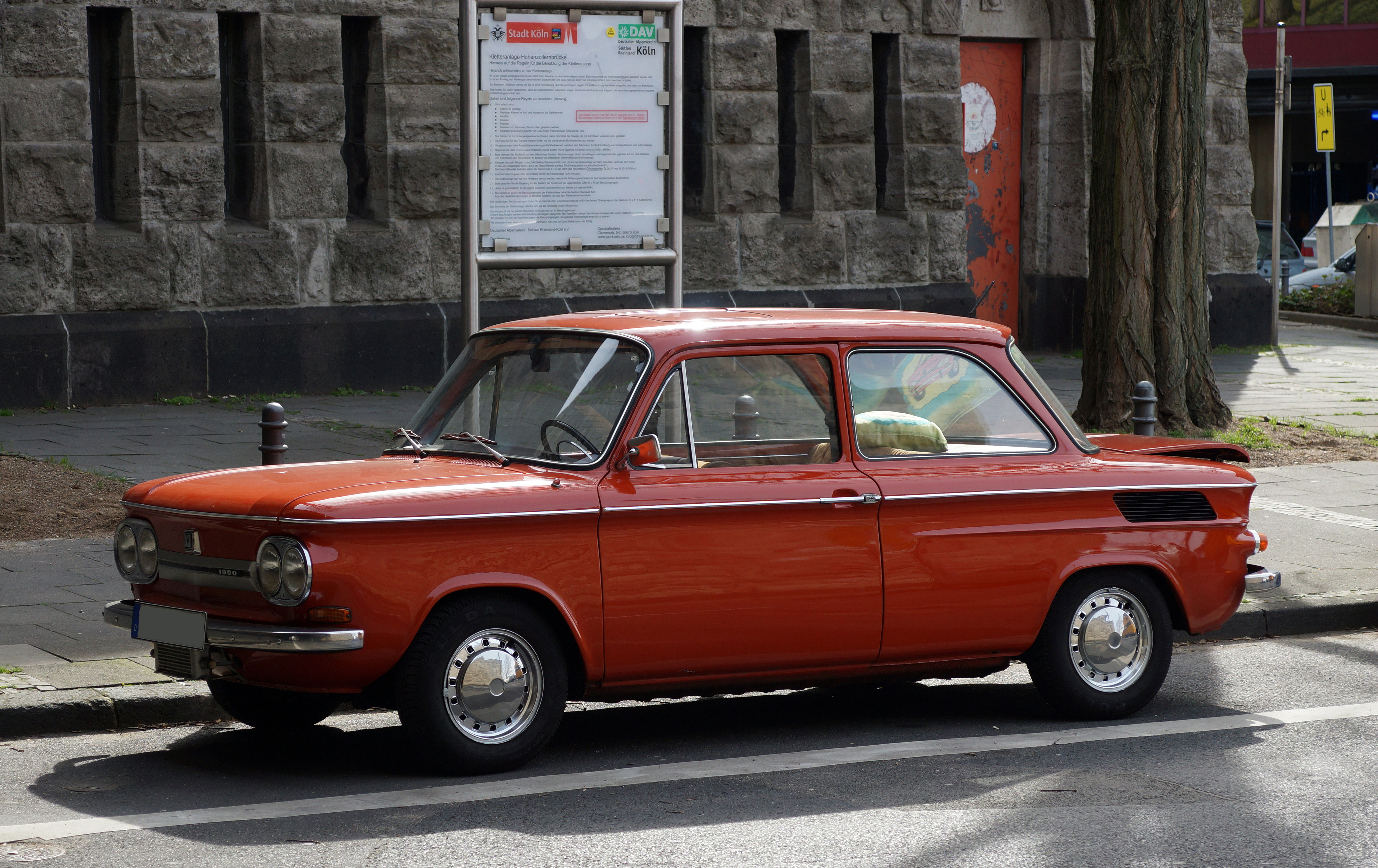 NSU Prinz 1000, Baujahr 1966. Aufgenommen in Köln.